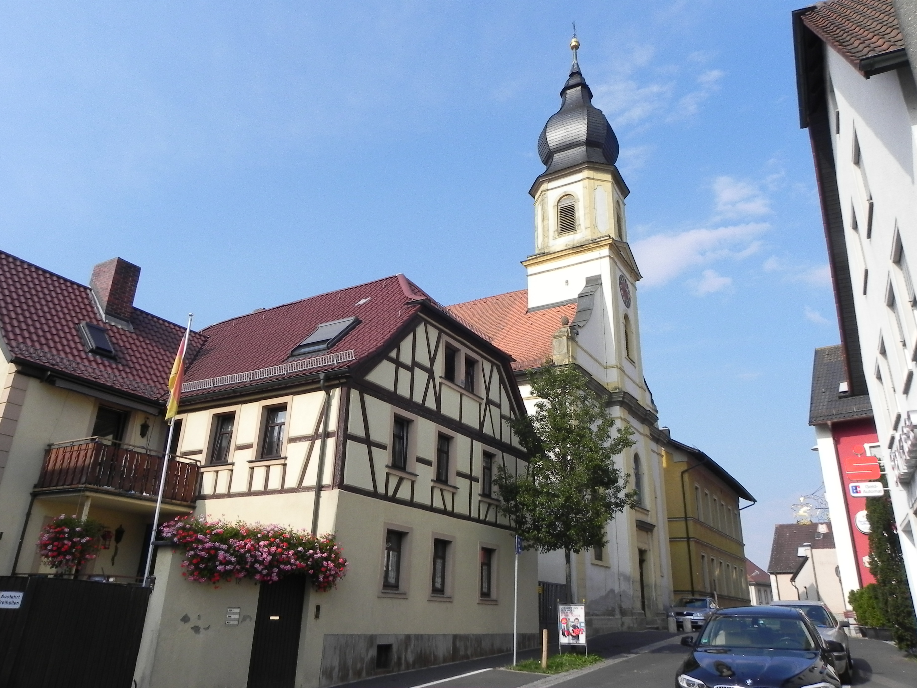 Würzburg Lengfeld St. LaurentiusThis is a photograph of an architectural monument.